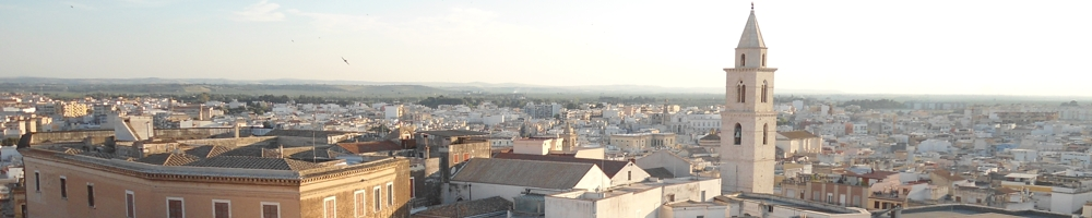 Panorama della città di Andria